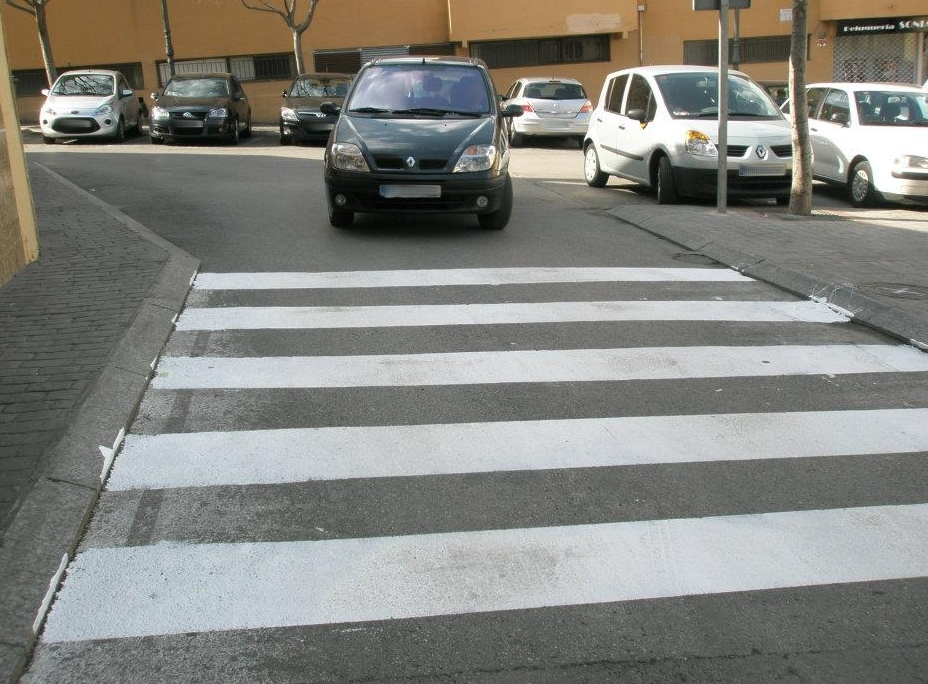 Paso de cebra mal pintado en Godella, Valencia, España.